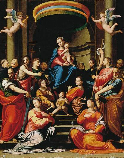 Sacra Conversazion di fra Paolino (1528)